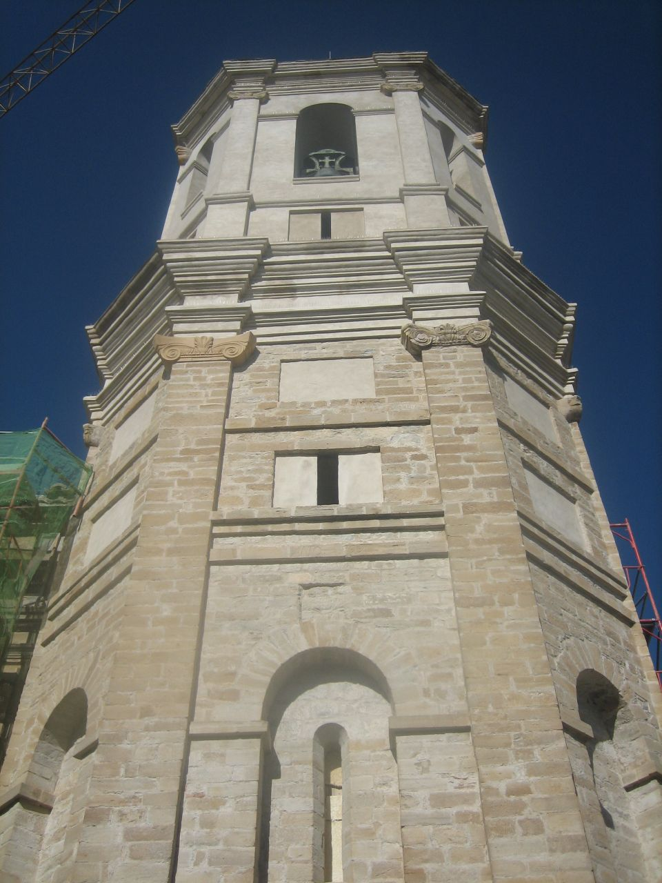 Roda de Isábena, Huesca Aragón España